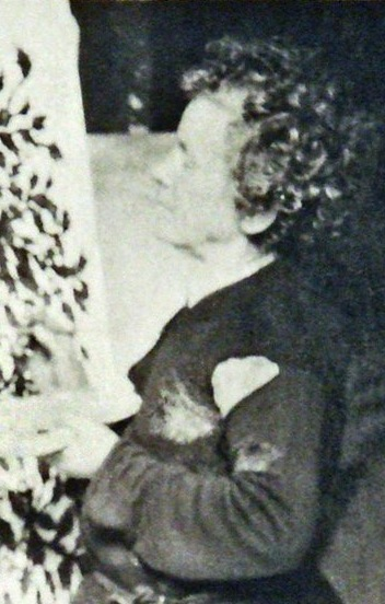 Cropped from the original file